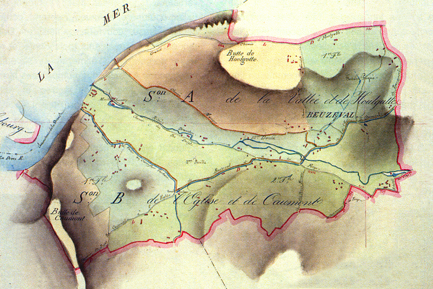 plan d'assemblage des feuilles du cadastre de la commune de Beuzeval